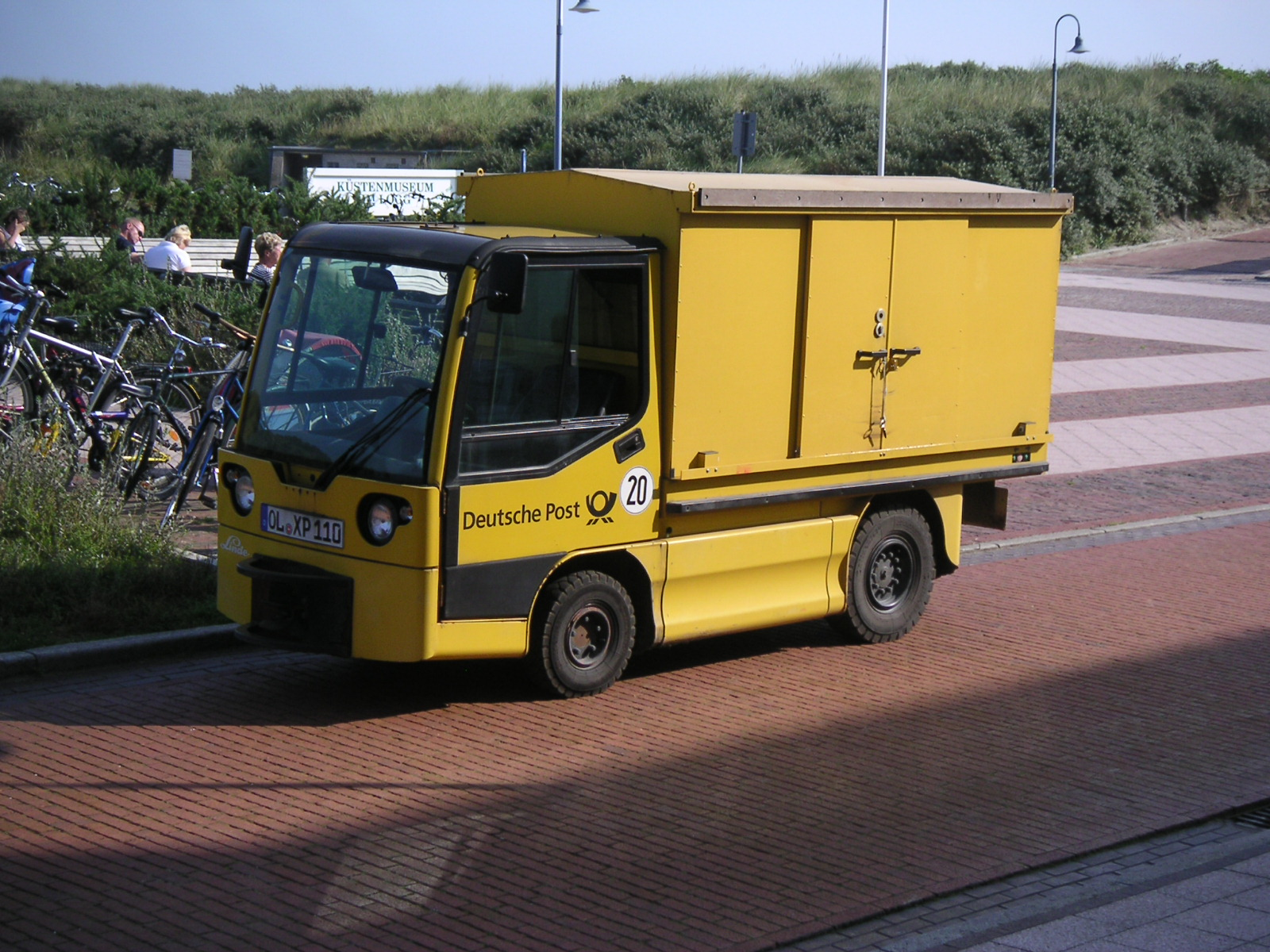 Elektrokarren der Post AG auf der Nordsee-Insel Juist